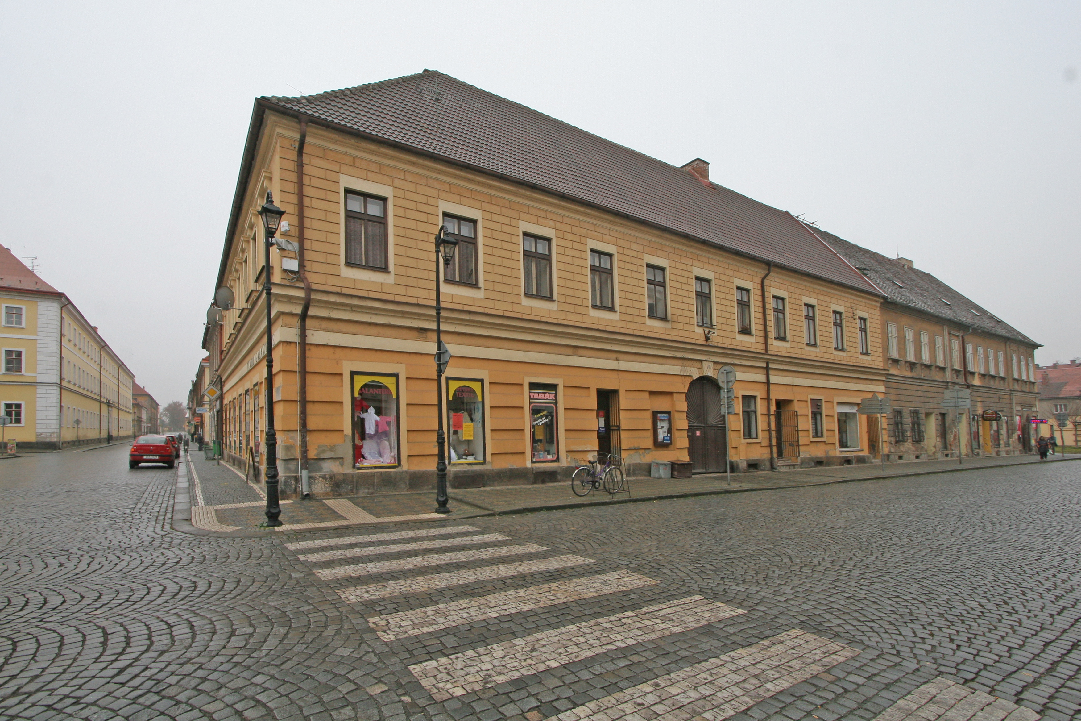 Městský dům (Josefov), Zdeňka Němečka 26, Josefov.